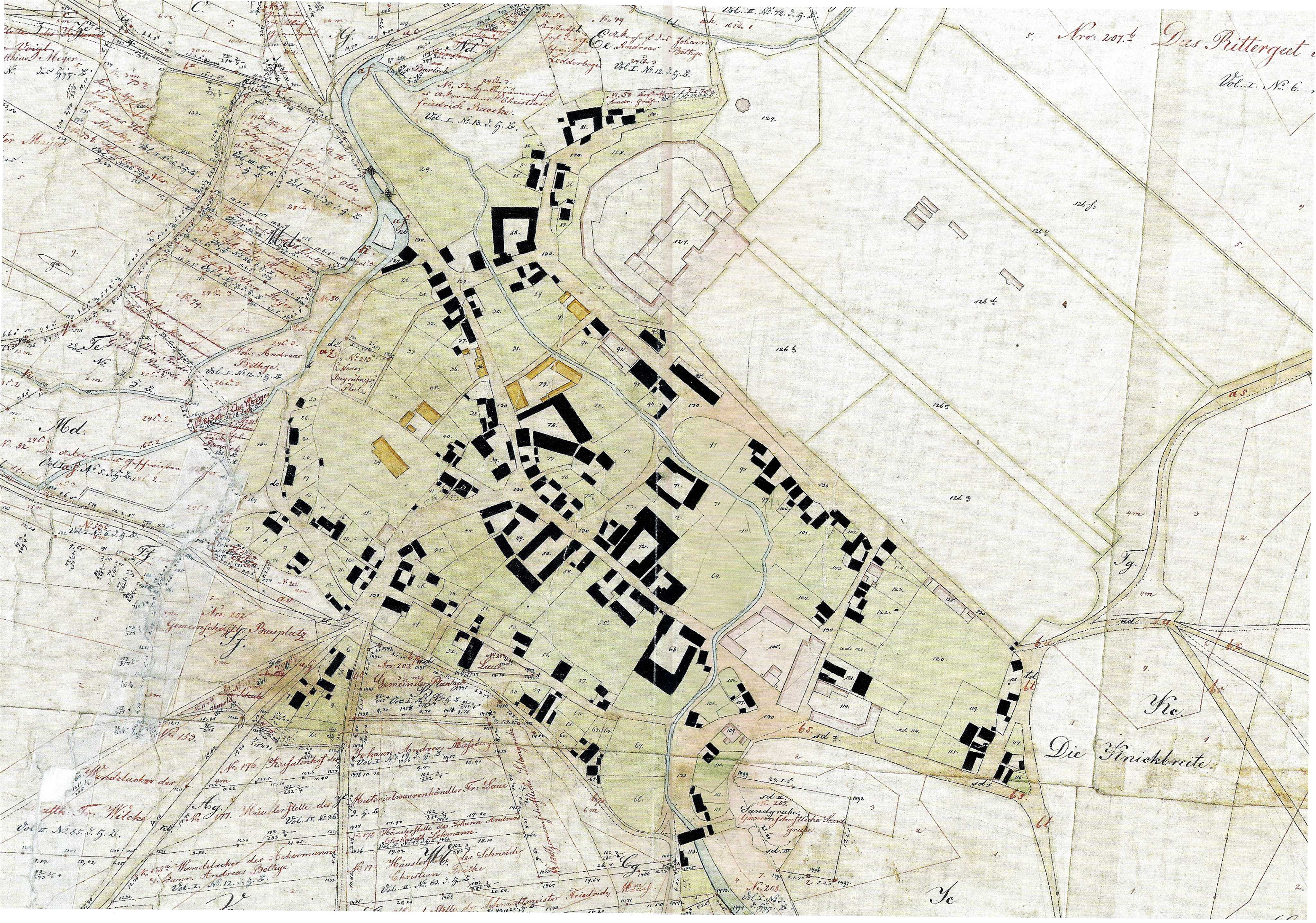 Karte von Hundisburg